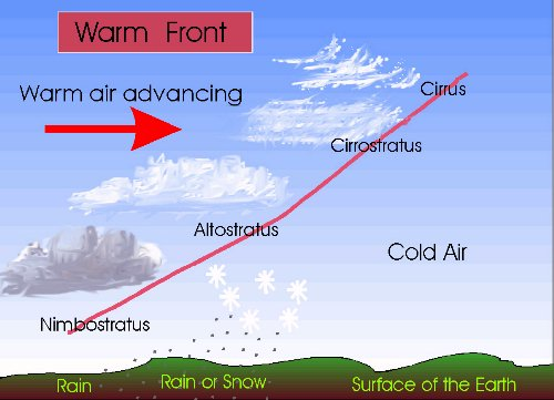 Српски (ћирилица): Утицај топлог фронта